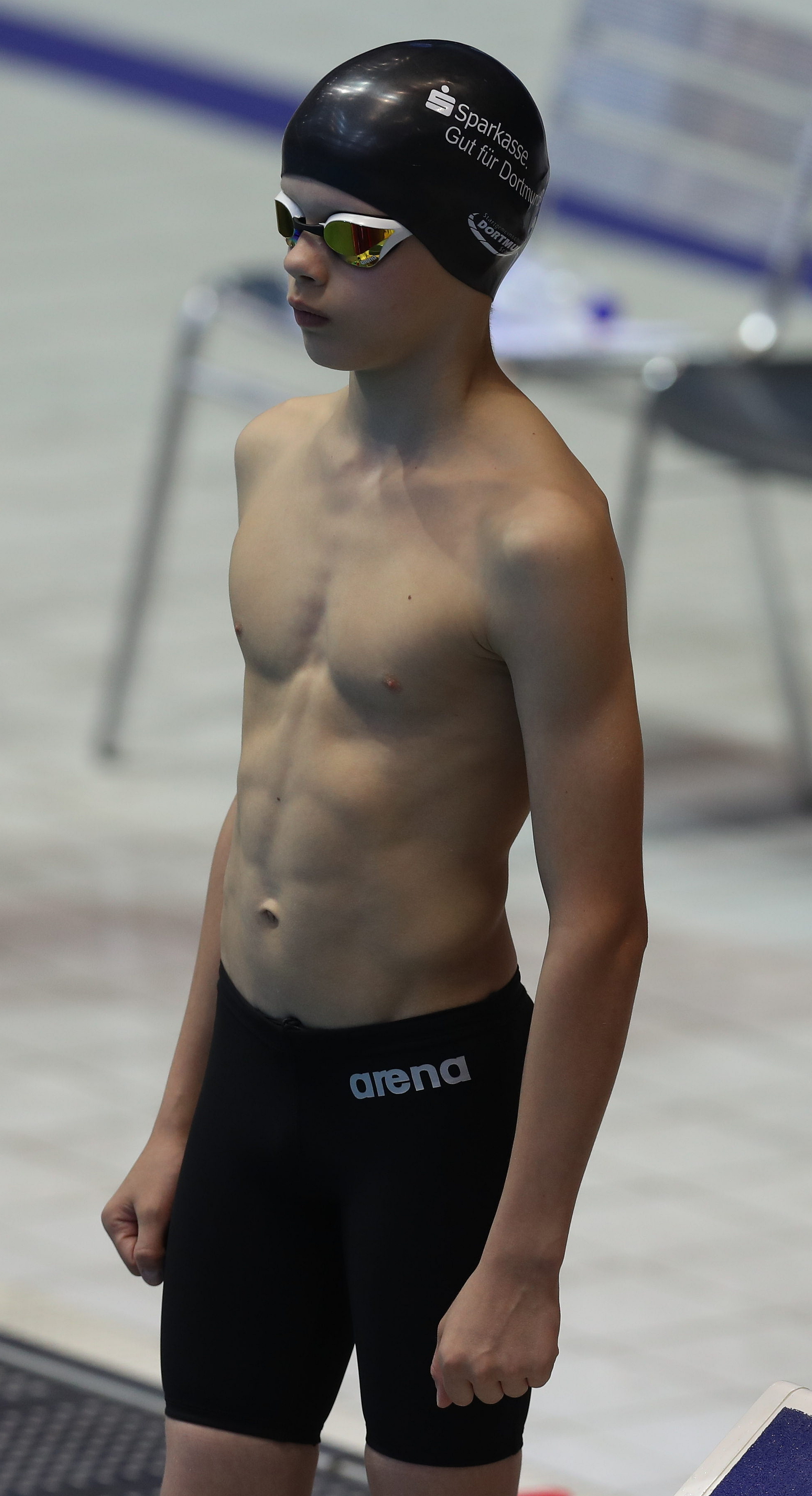 Kilpauimari odottaa startia. Uimarilla on päässään uimalakki ja uimalasit.